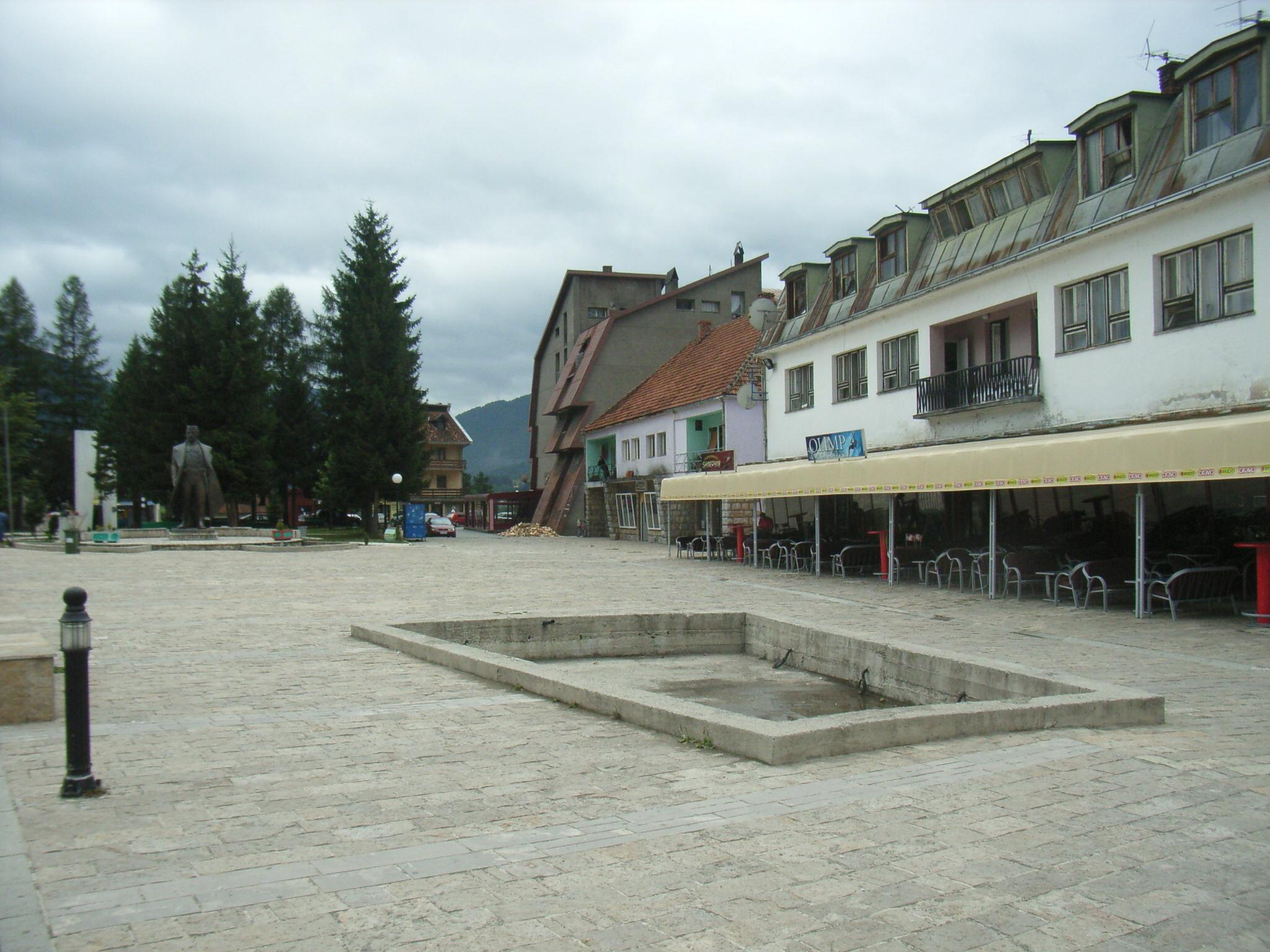 Stadtzentrum von Mojkovac in Montenegro